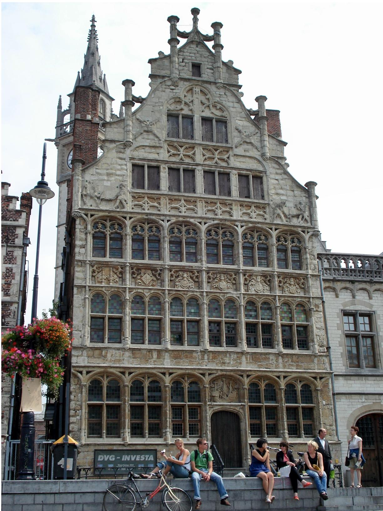 Gent, Graslei, Gildenhuis der Vrije Schippers (1530). Gand, quai aux Herbes: maison des francs bateliers (1530).